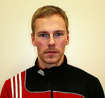 Koskenkorvan Urheilijoiden kauden 2014 pelaajakuva. Pelaaja: Mikko Kytömäki